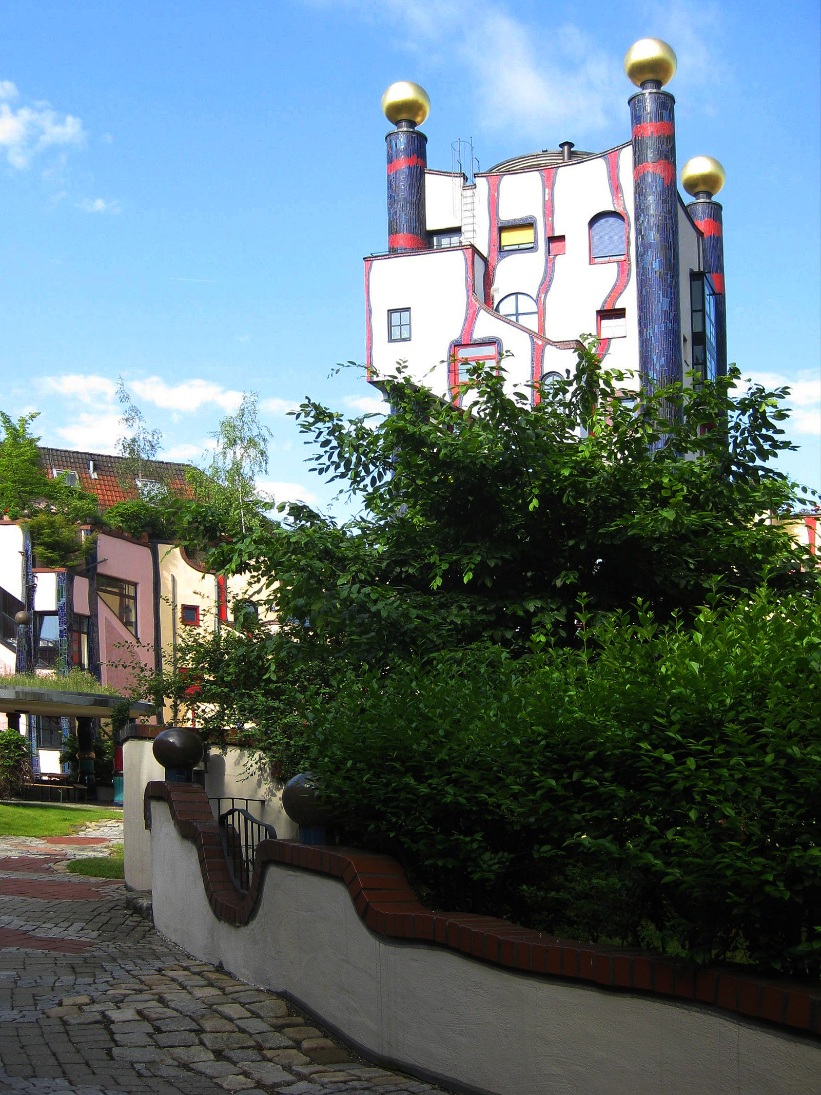 Friedensreich Hundertwasser, Wohnen unterm Regenturm – Detail – (1991/1994), - Deutschland, Baden-Württemberg, Plochingen, Zehntgasse/Neckarstraße